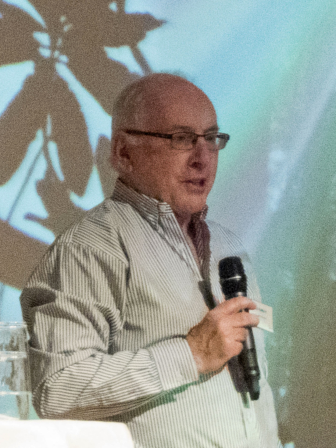 Paul Hebert foreleser om avdekking av jordens naturmangfold gjennom DNA-strekkoder, The 2015 NorBol symposium, Trondheim.